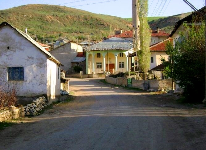 Akçakışla - Köy içi görünüm